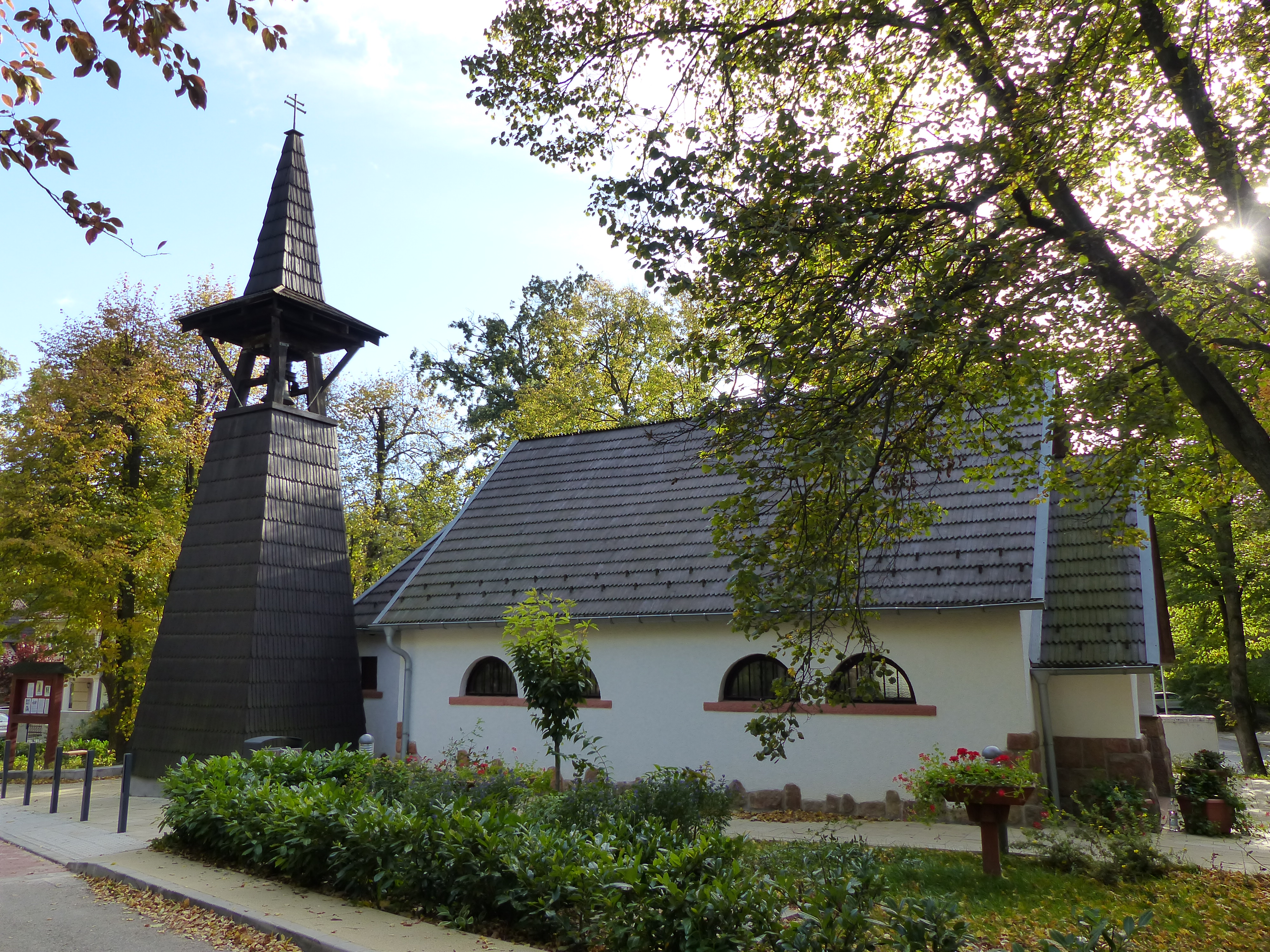 Adyligeti Kápolna. A felvétel 2017. október 6-án, pénteken készült Adyliget, Rézsű utcából.